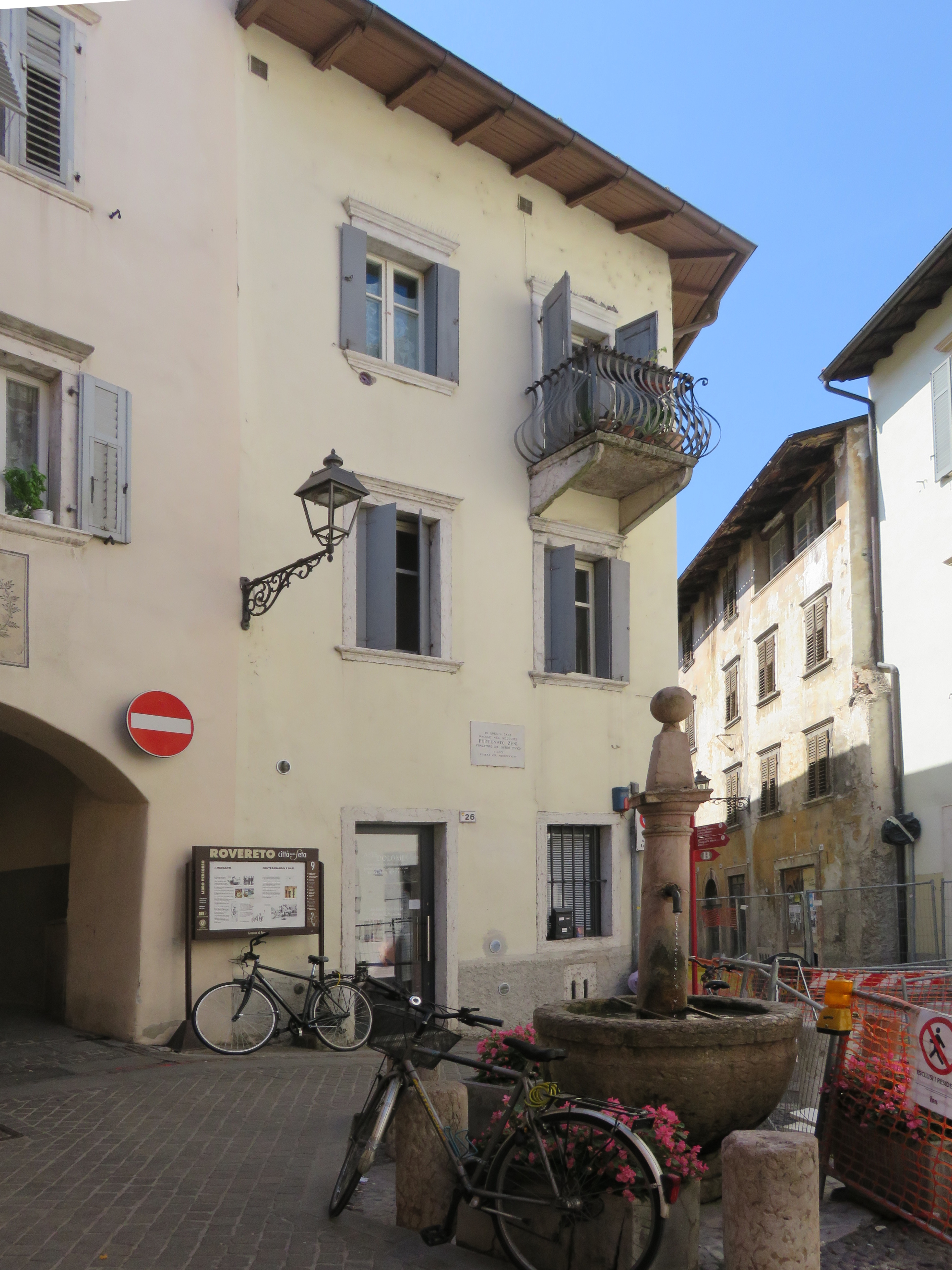 Borgo San Tommaso, oggi Borgo Santa Maria, a Rovereto. Casa natale di Fortunato Zeni